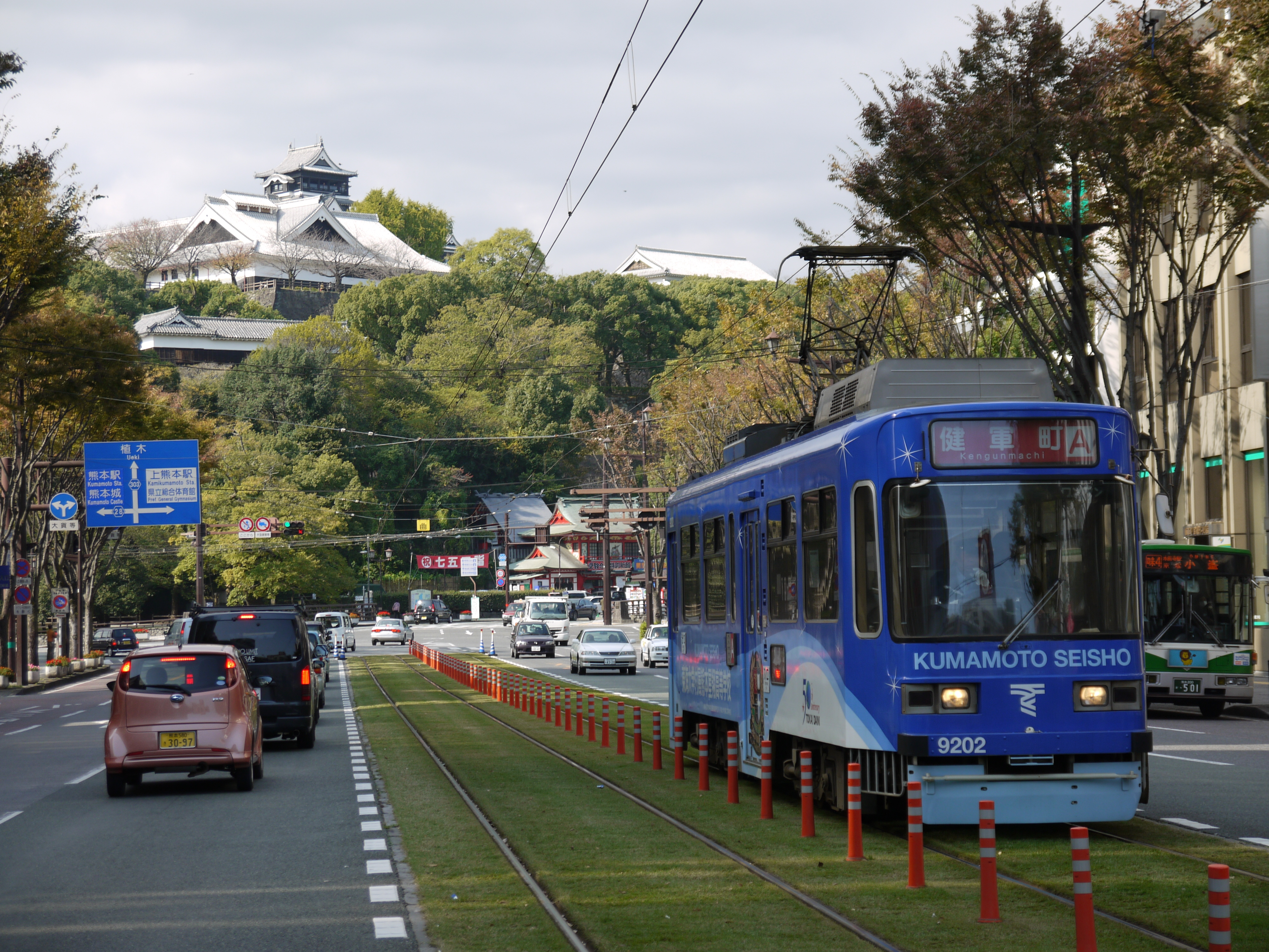 熊本城と熊本市電